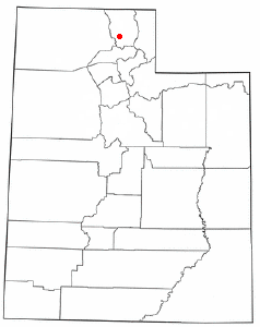 Localización de Paradise, Utah